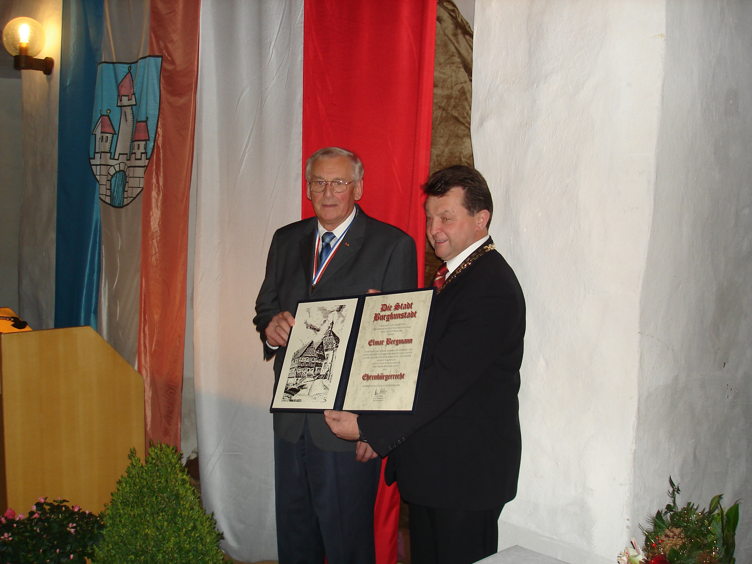 Offizielles Bild der Verleihung des Ehrenbürgerstatuses der Stadt Burgkunstadt an den Kommunalpolitiker Elmar Bergmann